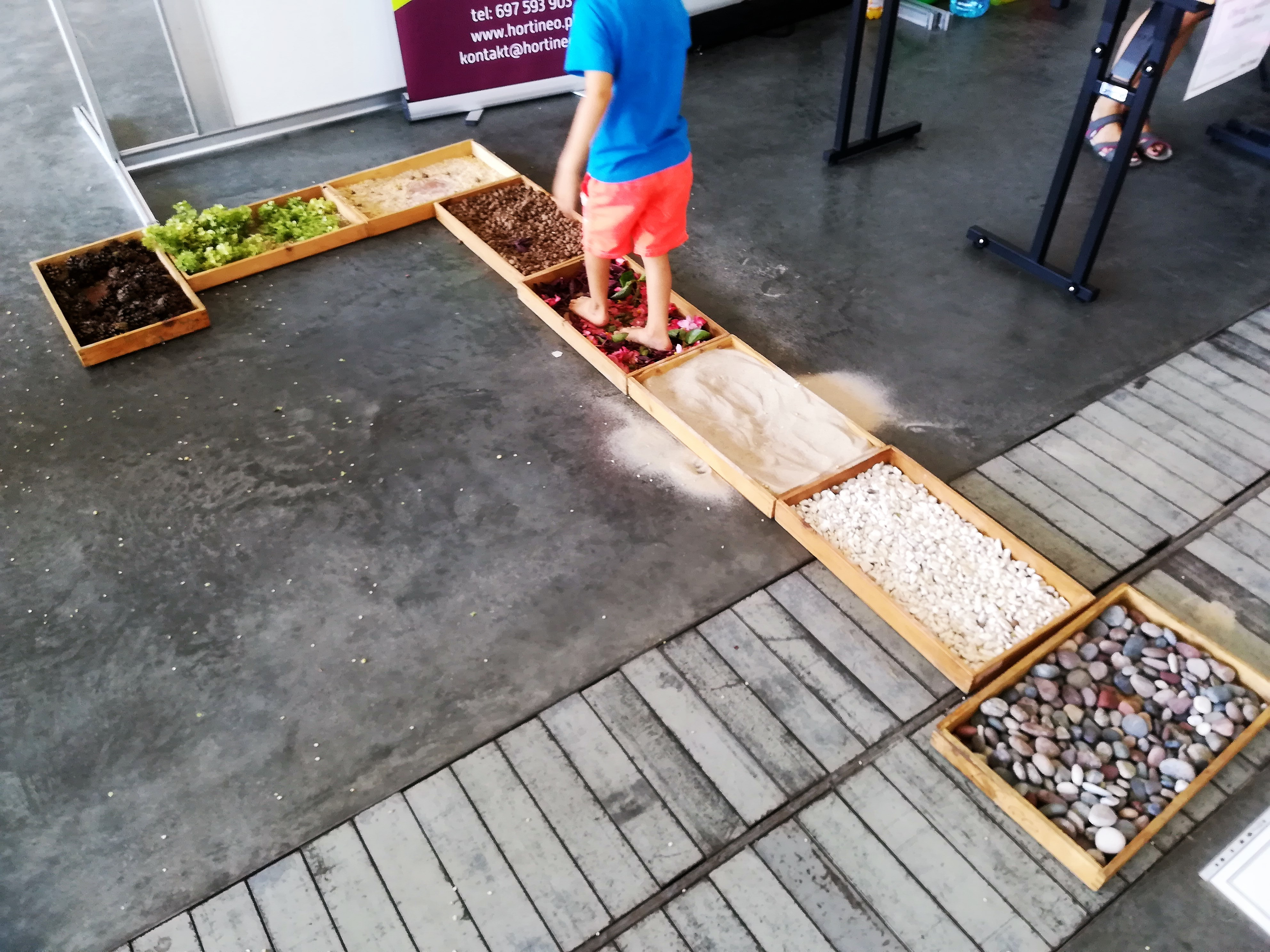 Impreza dla dzieci Lato na Targach w Poznaniu - 2018r. MTP, paw. 4.